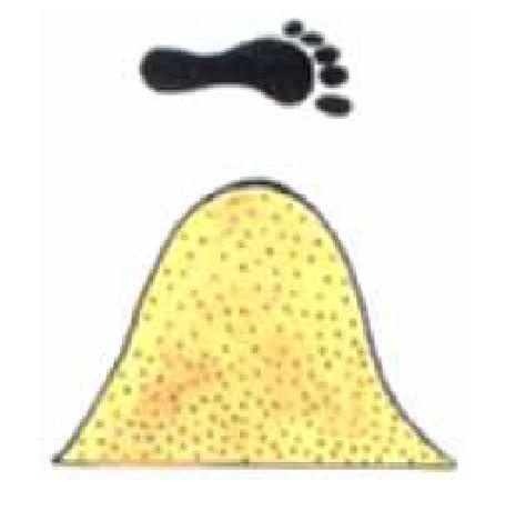 Toponimia de Tlaltizapan, la cual representa un pie y un cerro de tierra blanca